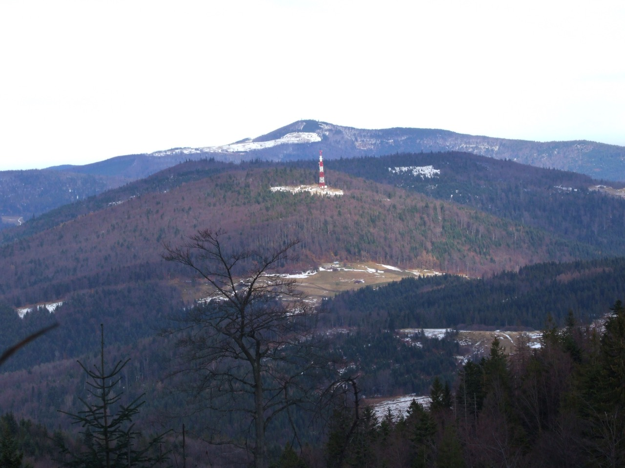 Kiczora Kamienicka w Gorcach i Mogielica w Beskidzie Wyspowym